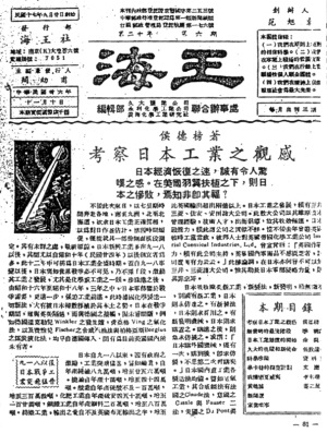 Newspaper Haiwang 1928